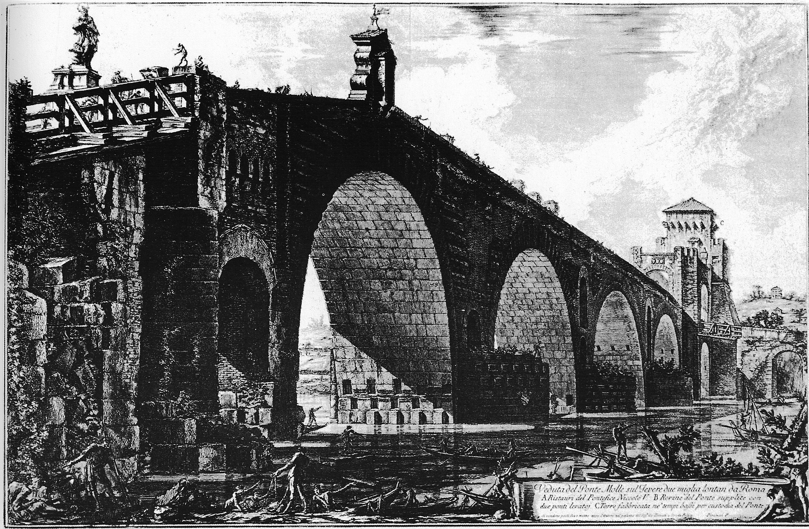 Imago pontis milvii a Ioanne Baptista Piranesio (Giovanni Battista Piranesi) facta. A sumpta, sed opus antiquum, ergo publici iuris.